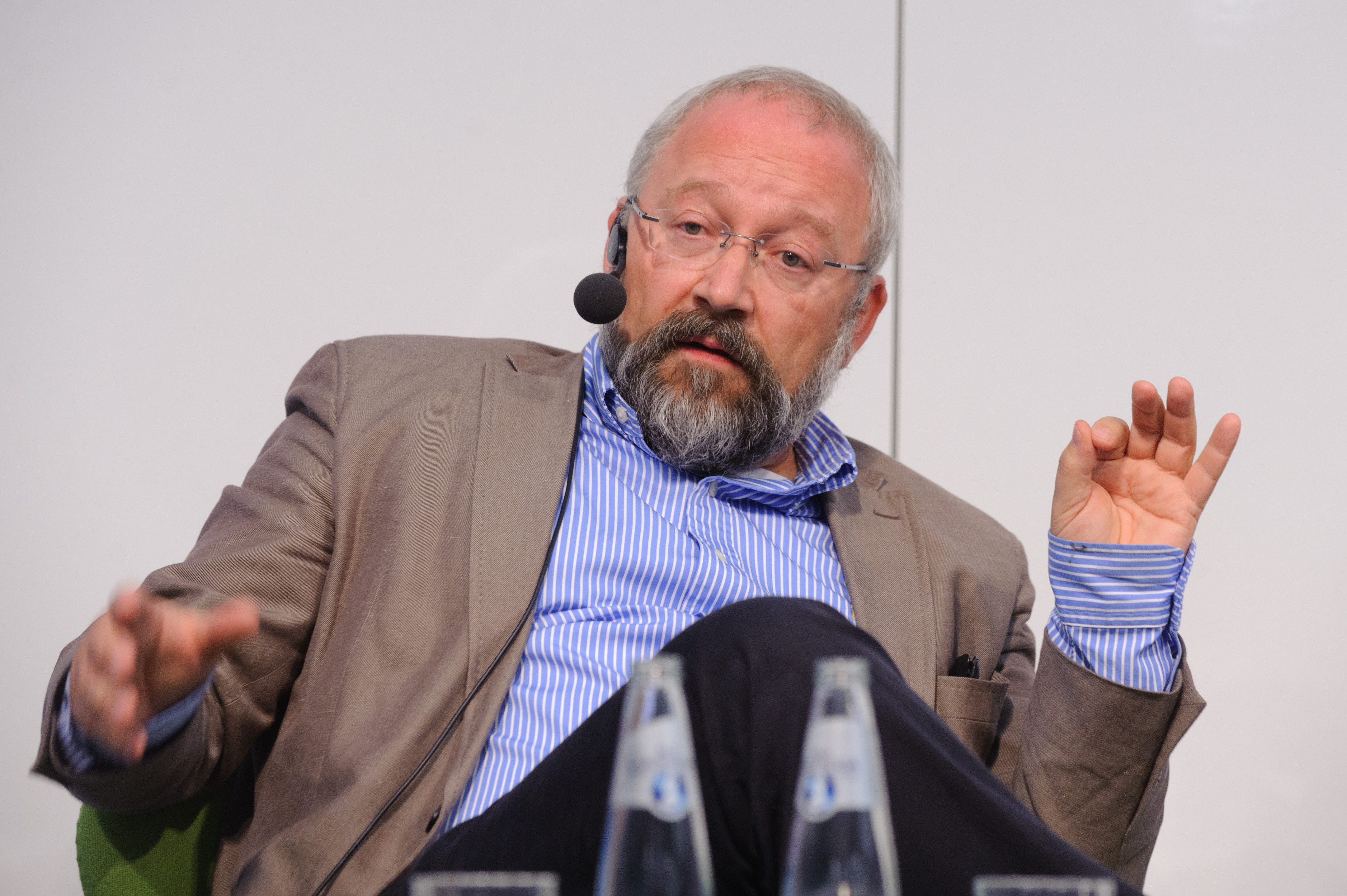 Podiumsdiskussion: Zehn Jahre danach. Hat der 11. September 2001 die Welt verändert? Foto: Stephan Röhl Prof. Dr. Herfried Münkler (Lehrstuhl Theorie der Politik, Humboldt-Universität Berlin)